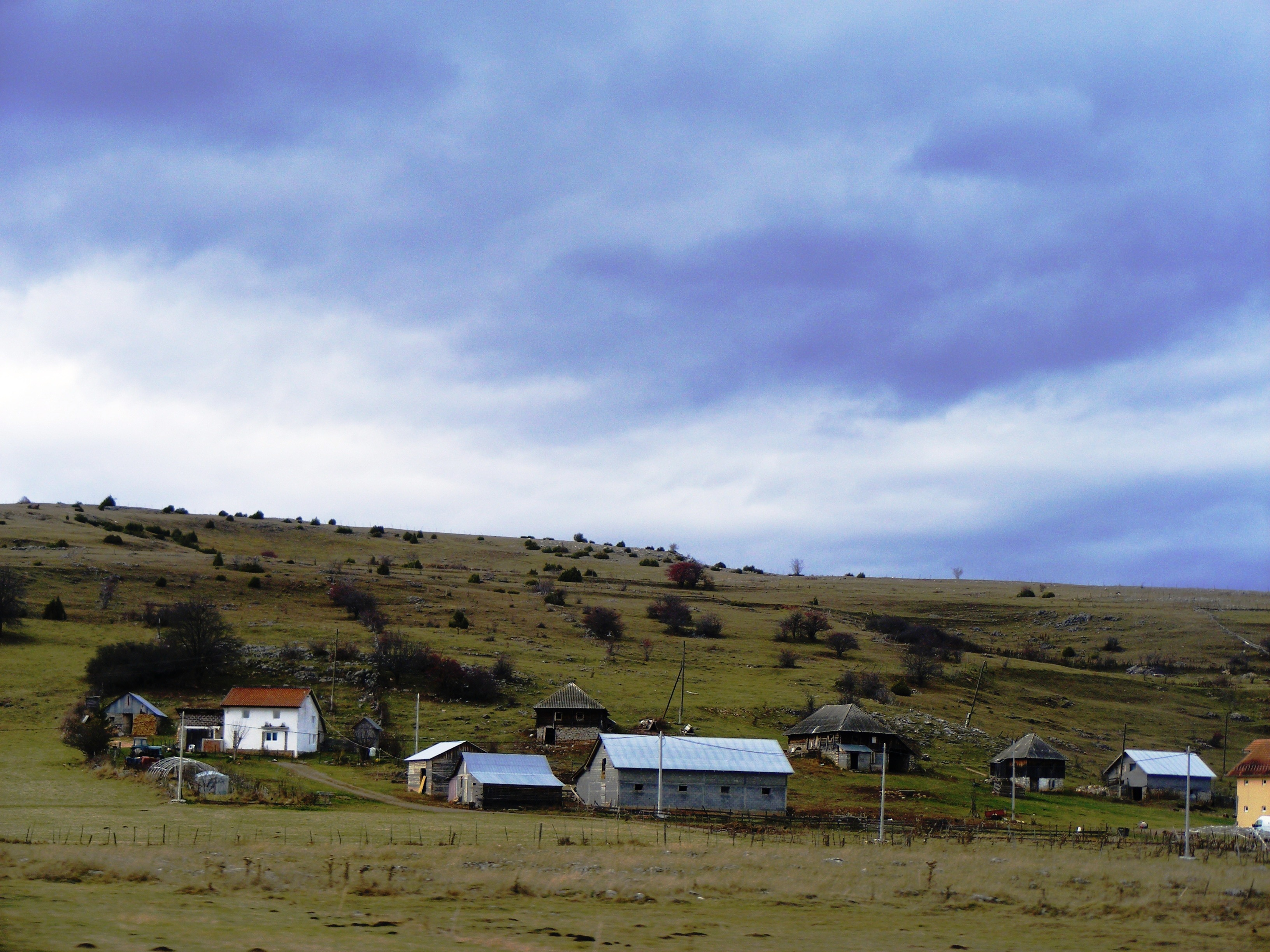 Vendbanimi Boroshticë Peshter, Sanxhak